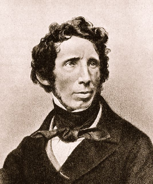 Friedrich_Wöhler (1800-1882)